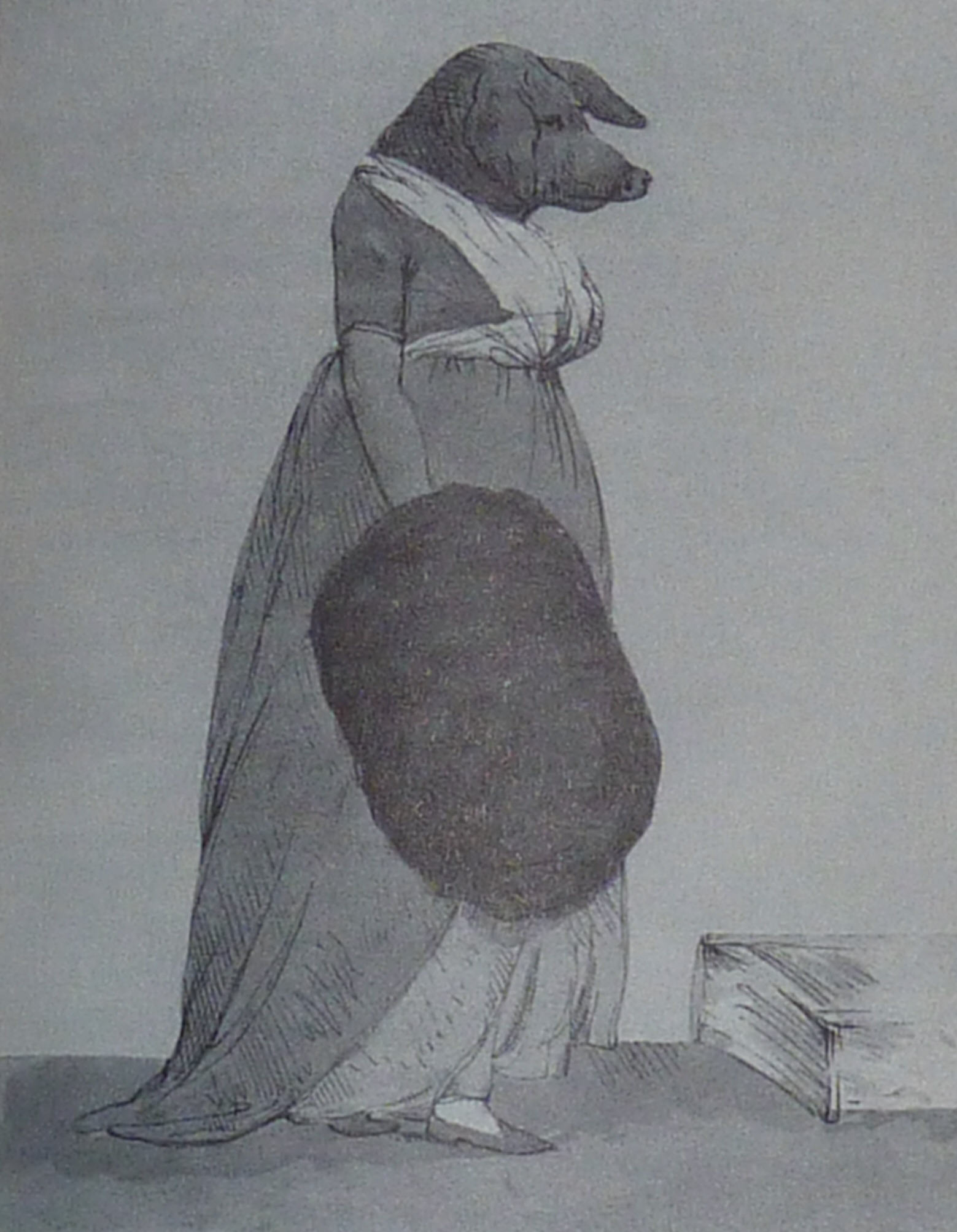 die schweinsköpfige Mrs. Atkinson (the pig-headed Mrs. Atkinson)